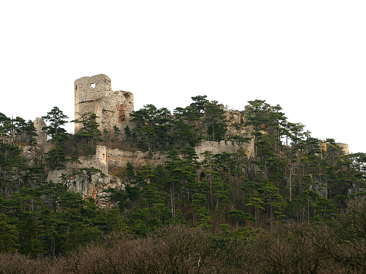 Winzendorf Burgruine Emmerberg (Bild 2)